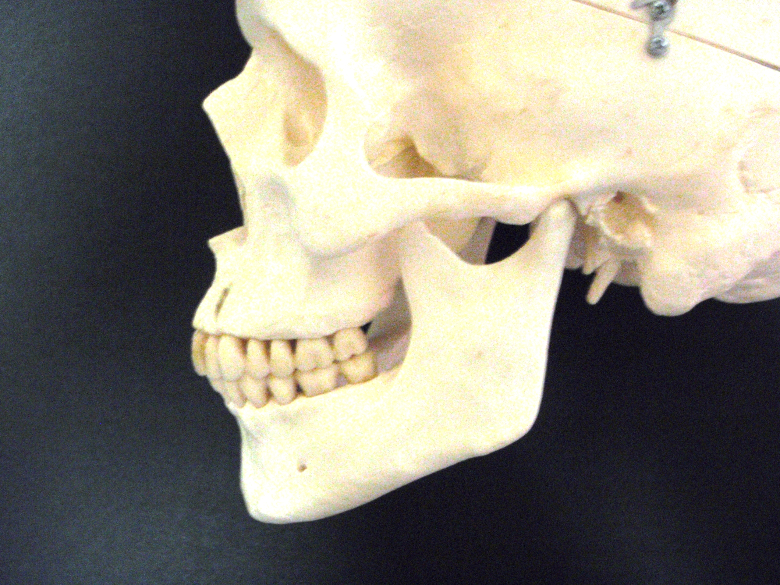 鋏状咬合を示す頭骨。2011年8月末、自宅にて作成。